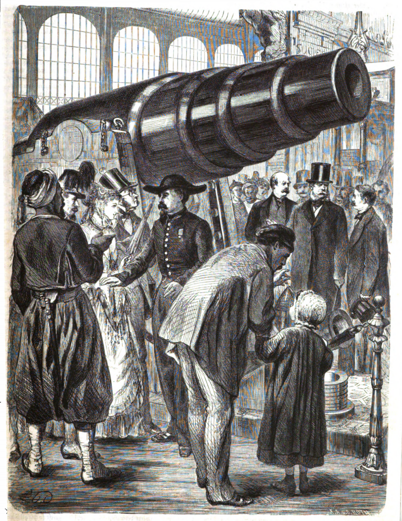 Weltausstellung 1867 in Paris: König Wilhelm und Otto von Bismarck bei der Krupp'schen Riesenkanone. (Im Vordergrund Kaiser Napoléon III.) Für das Daheim gezeichnet von Ludwig Pietsch